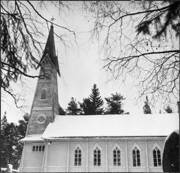 Kyrkan från öster Kategori: (01) ExteriörerKyrkan från öster.